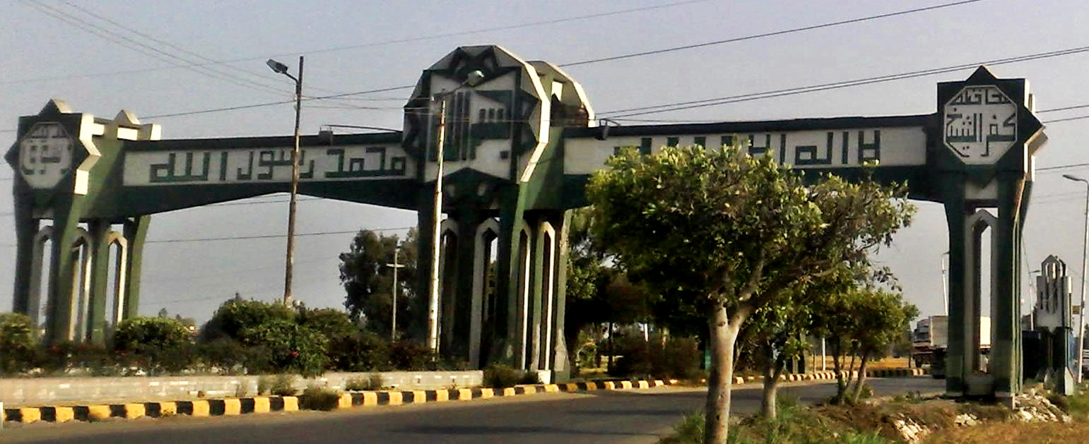 بوابة مدينة دسوق على الطراز الإسلامي على طريق الإسكندرية